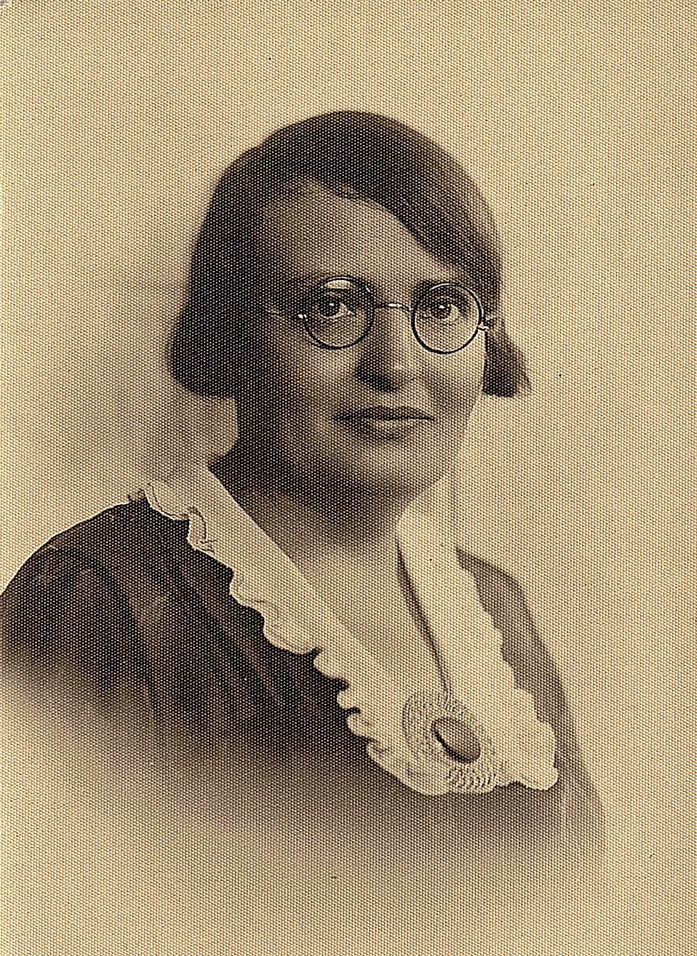 תמונה של דיבשה אמירה, Divsha Amira.JPG